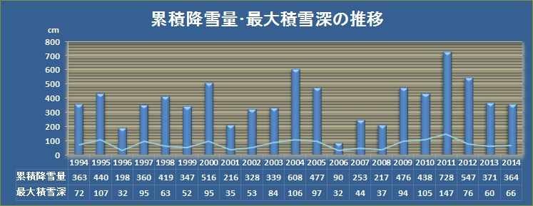 累積降雪量･最大積雪深の推移(見附市)